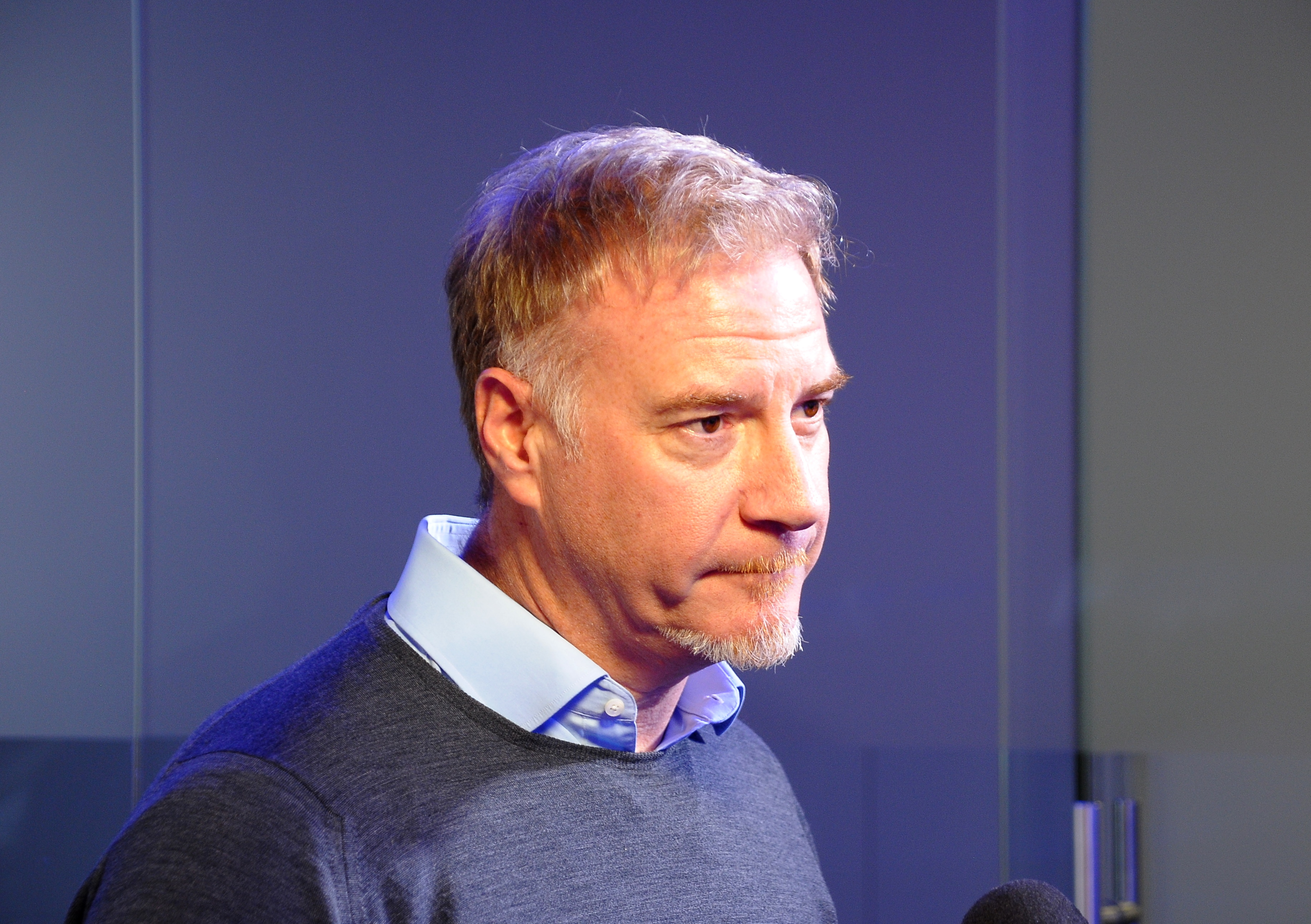 Марек Райхман, шеф-дизайнер марки Aston Martin во время визита в Москву, январь 2020 года